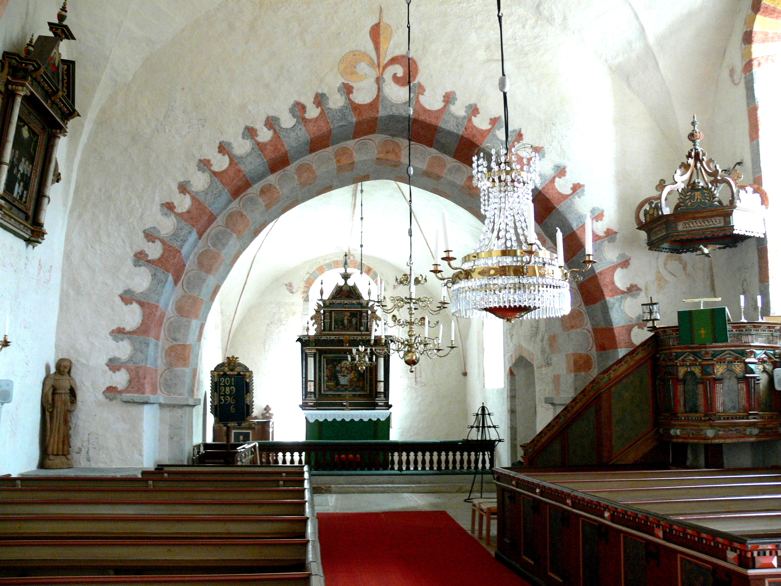 Bäl kyrka auf Gotland. Altarraum